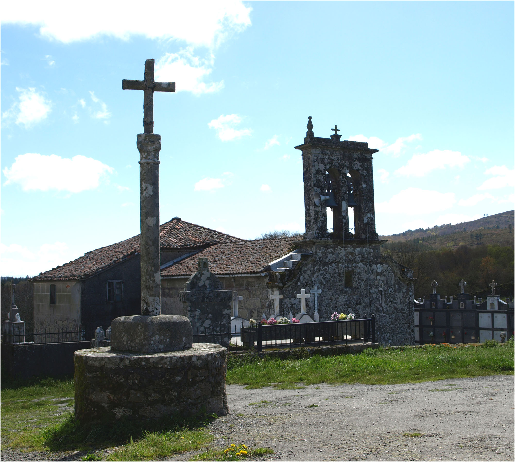 Igrexa de Santa Cristina de Areas (Antas de Ulla)